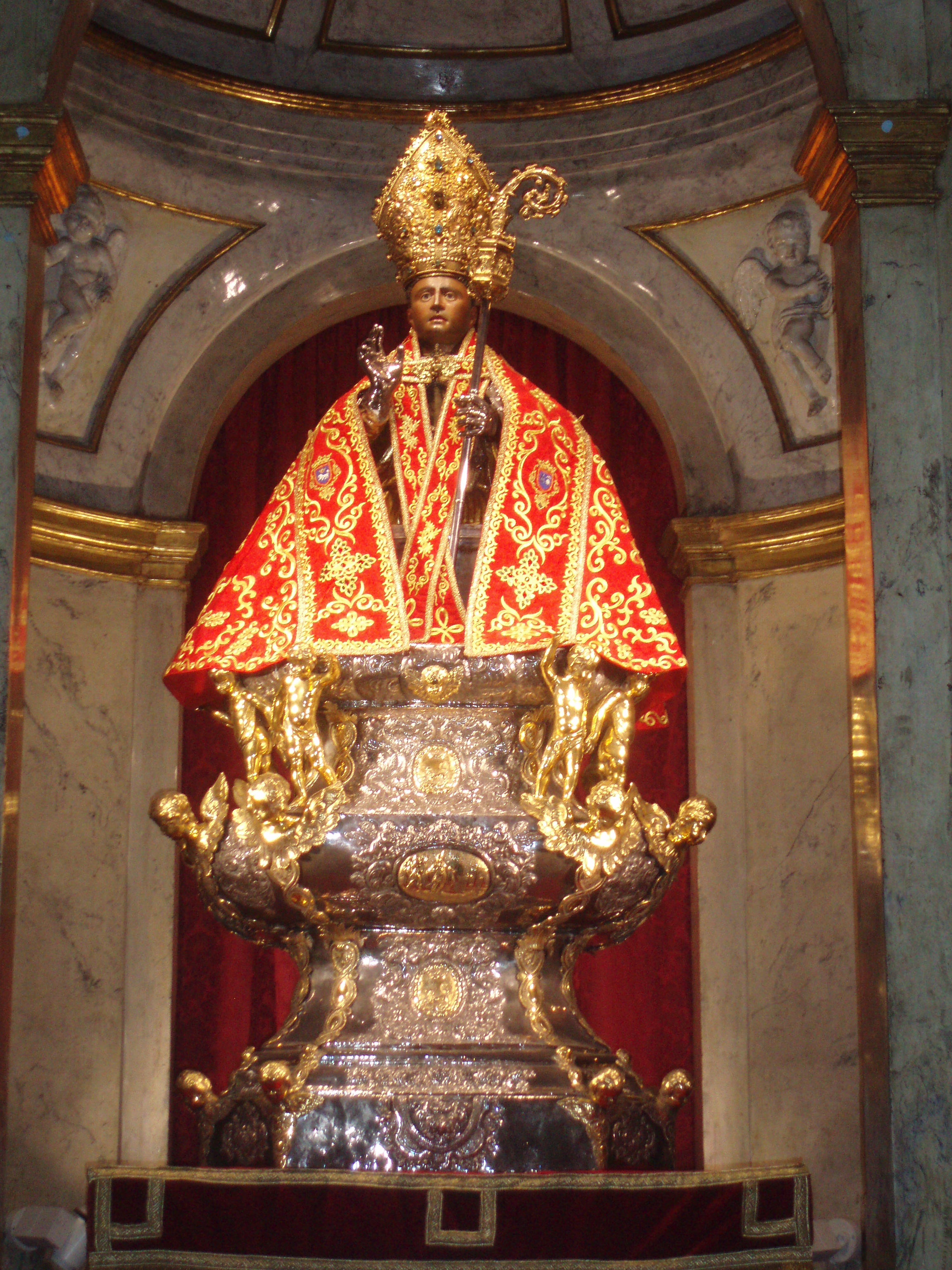 Busto de San Fermín. Iglesia de San Lorenzo de Pamplona. Navarra, (España).